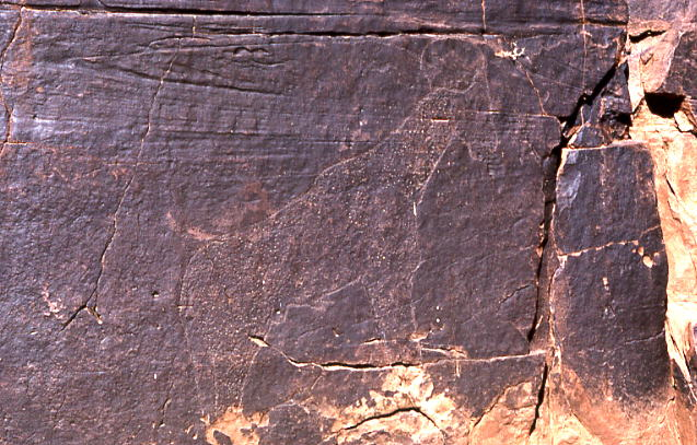 Gravures préhistoriques de la région d'El Bayadh, Algérie